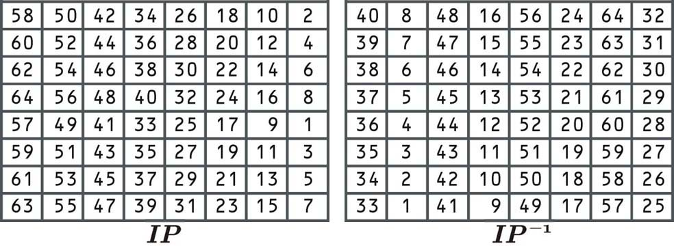 טבלת שיכול של DES